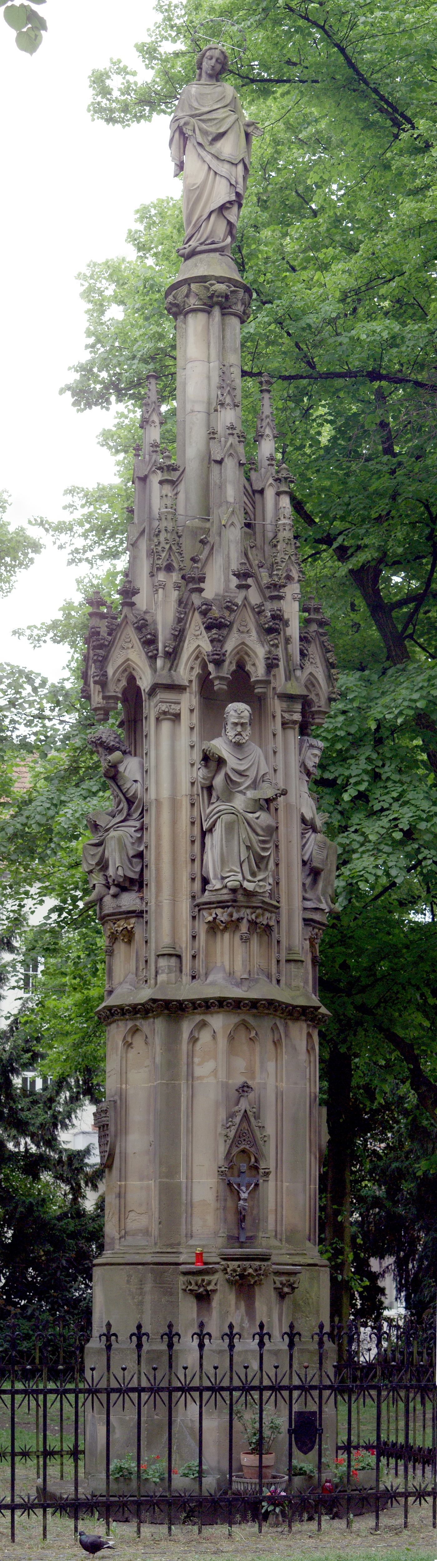 Mariensäule (Köln) - Gesamtansicht. Entwurf: Vincenz Statz.